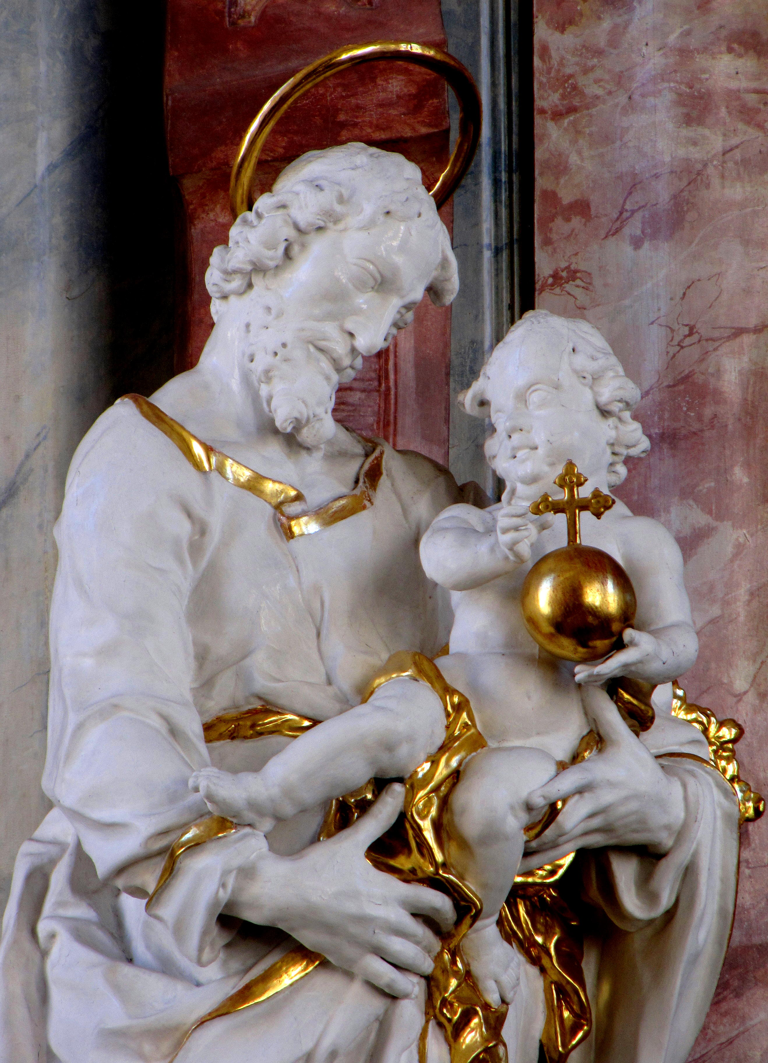 Hl. Joseph am Hochaltar in der Pfarrkirche Munderkingen von Joseph Stapf, Pfronten, 1738